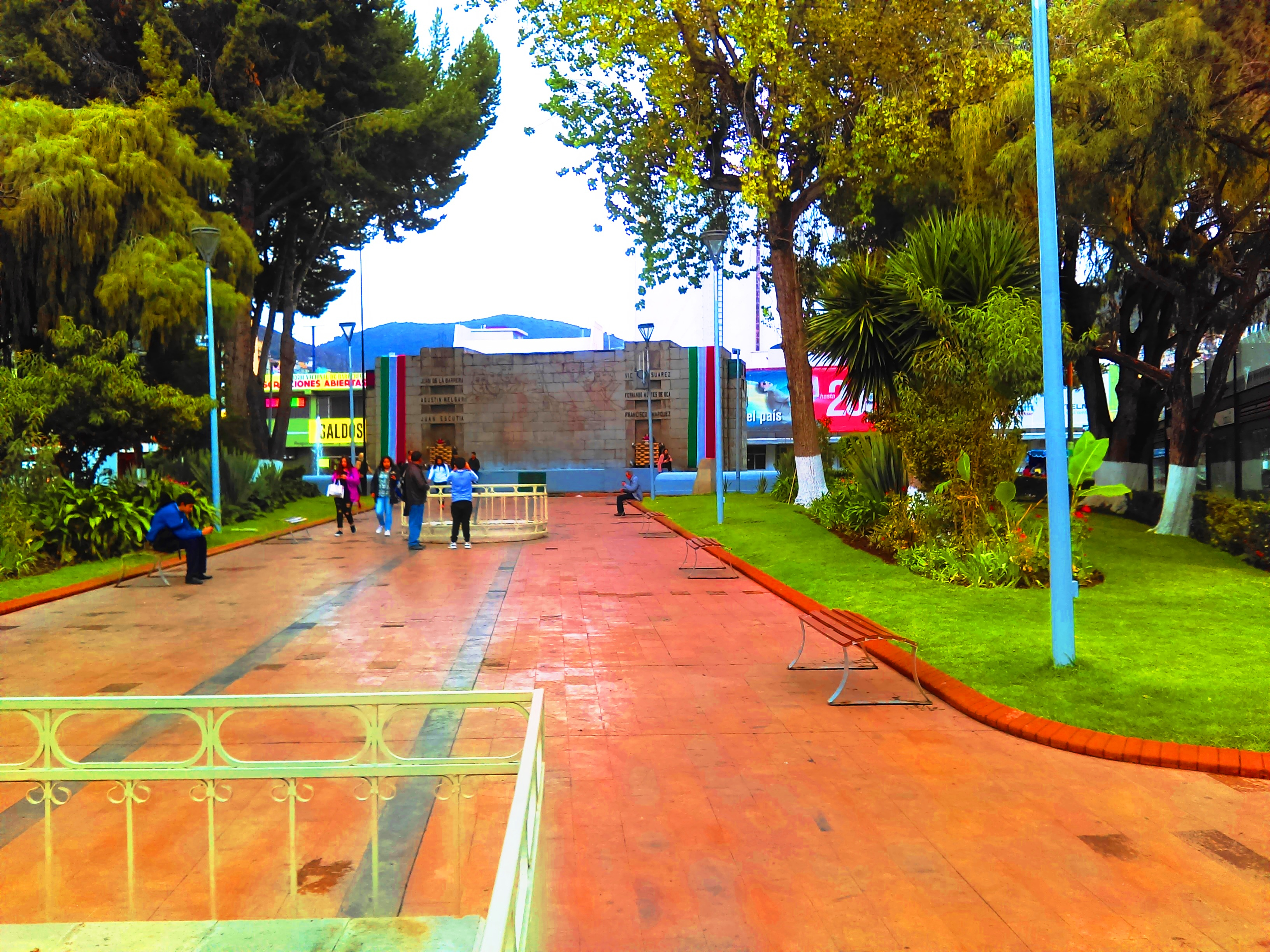 Jardín de los Niños Héroes (Pachuca)